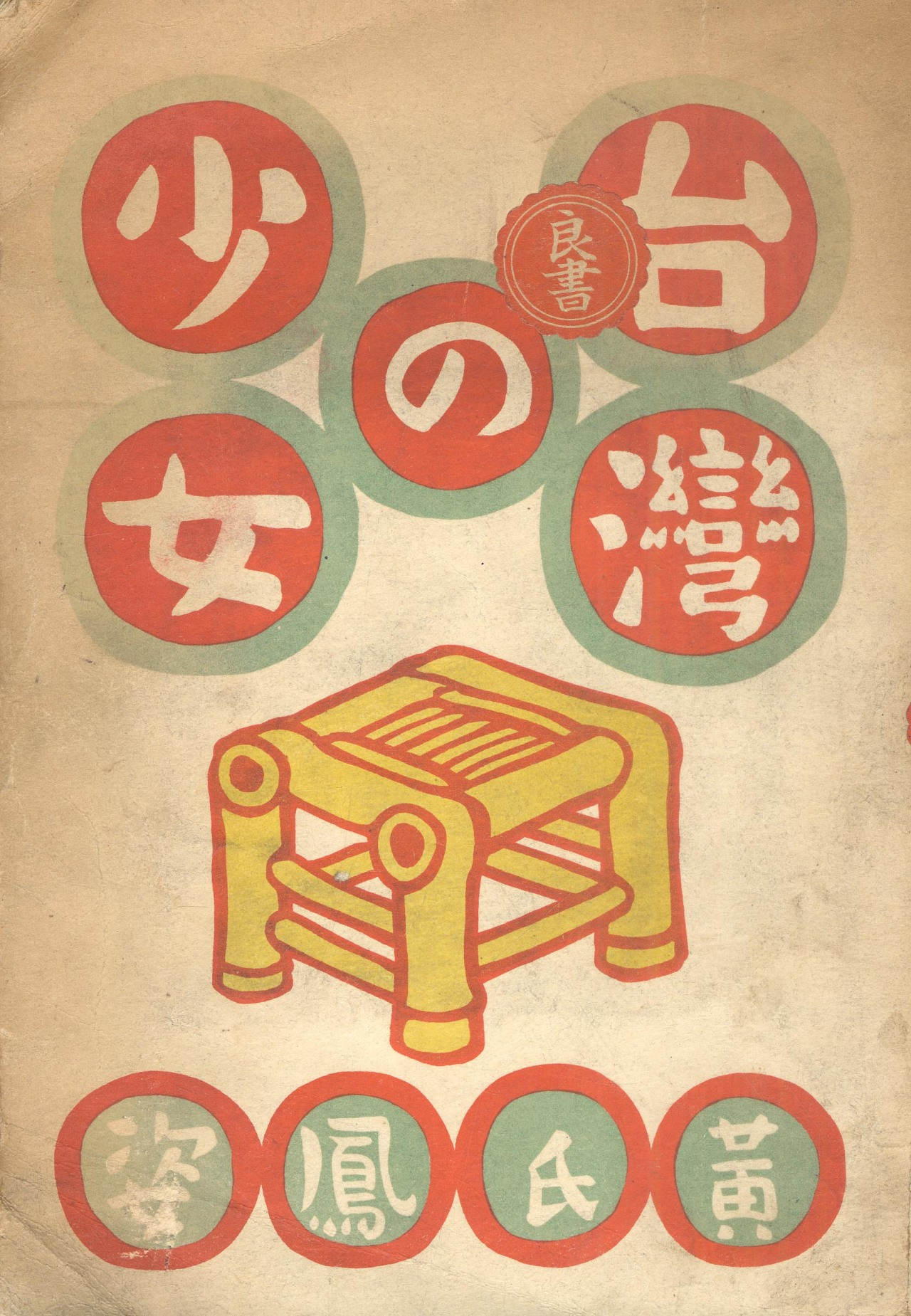 黃氏鳳姿作品《台灣の少女》封面。